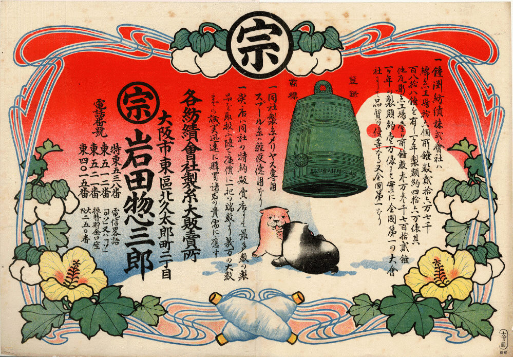 鐘淵紡績株式会社引札（岩田惣三郎）